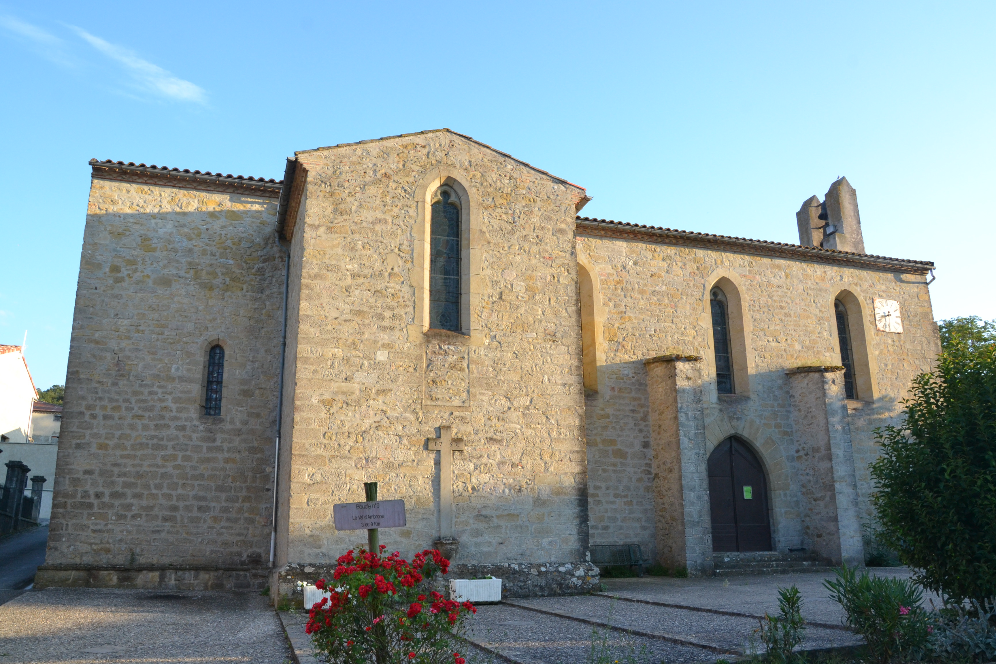 L'église Saint-Hilaire de Caudeval (Val de Lambronne, Aude, France).